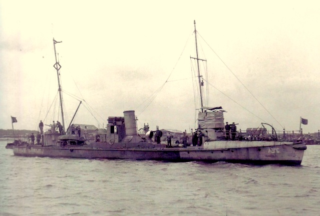 Torpilleur côtier belge A2PC puis A2 Prince Charles (ex-A 12 de la Kaiserliche Marine)